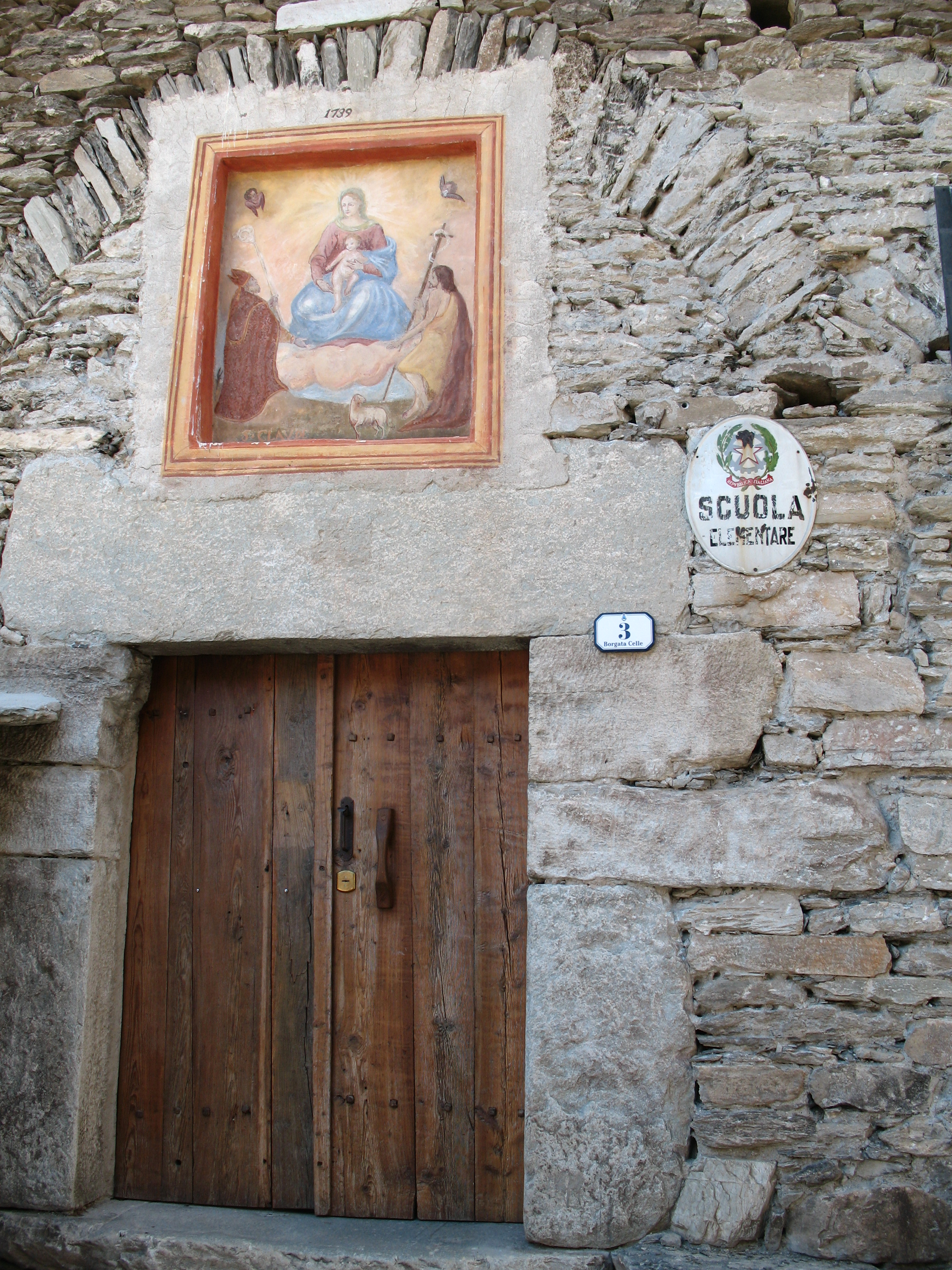 Eingang zur Scuola elementare von Celle di Bellino im piemontesischen Varaitatal, bzw. im Valle di Bellino